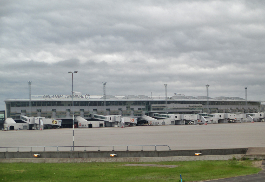 Flughafen Arlanda, Stockholm